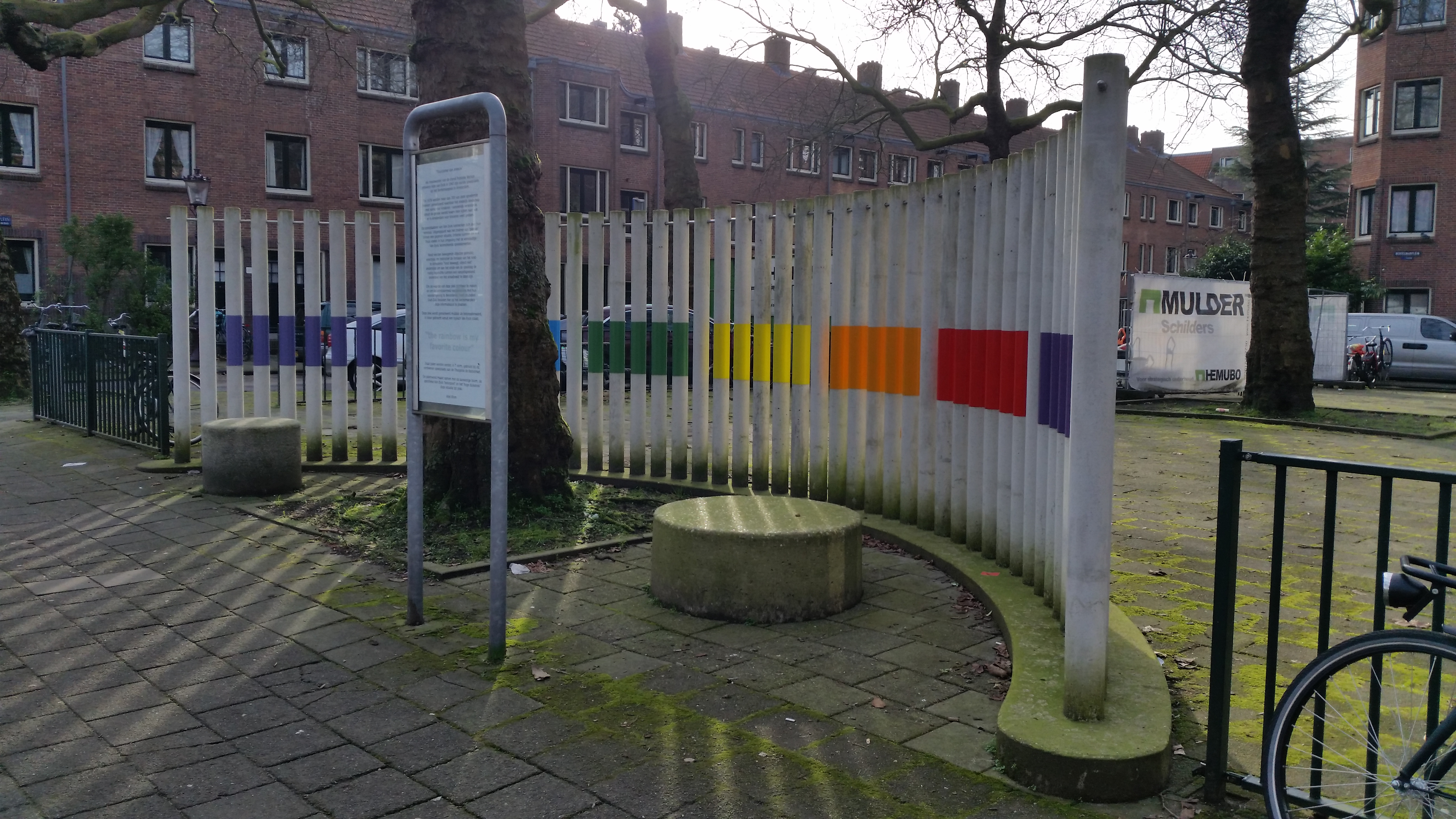 Palenwand :The rainbow is my favourite colour